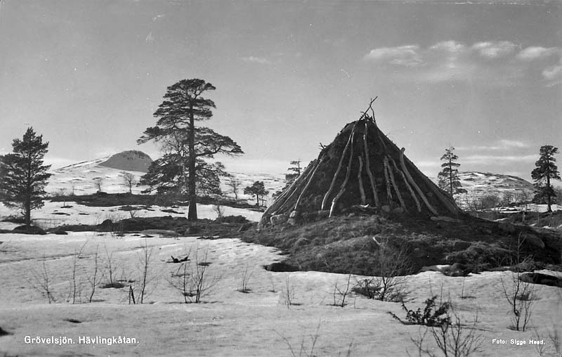 Hävlingkåtan.; Byggnadsverk; Fjällmiljö; Miljöer; Nomadnäring; Sameviste